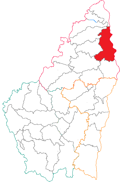 Situation du canton dans le département de l'Ardèche (France)